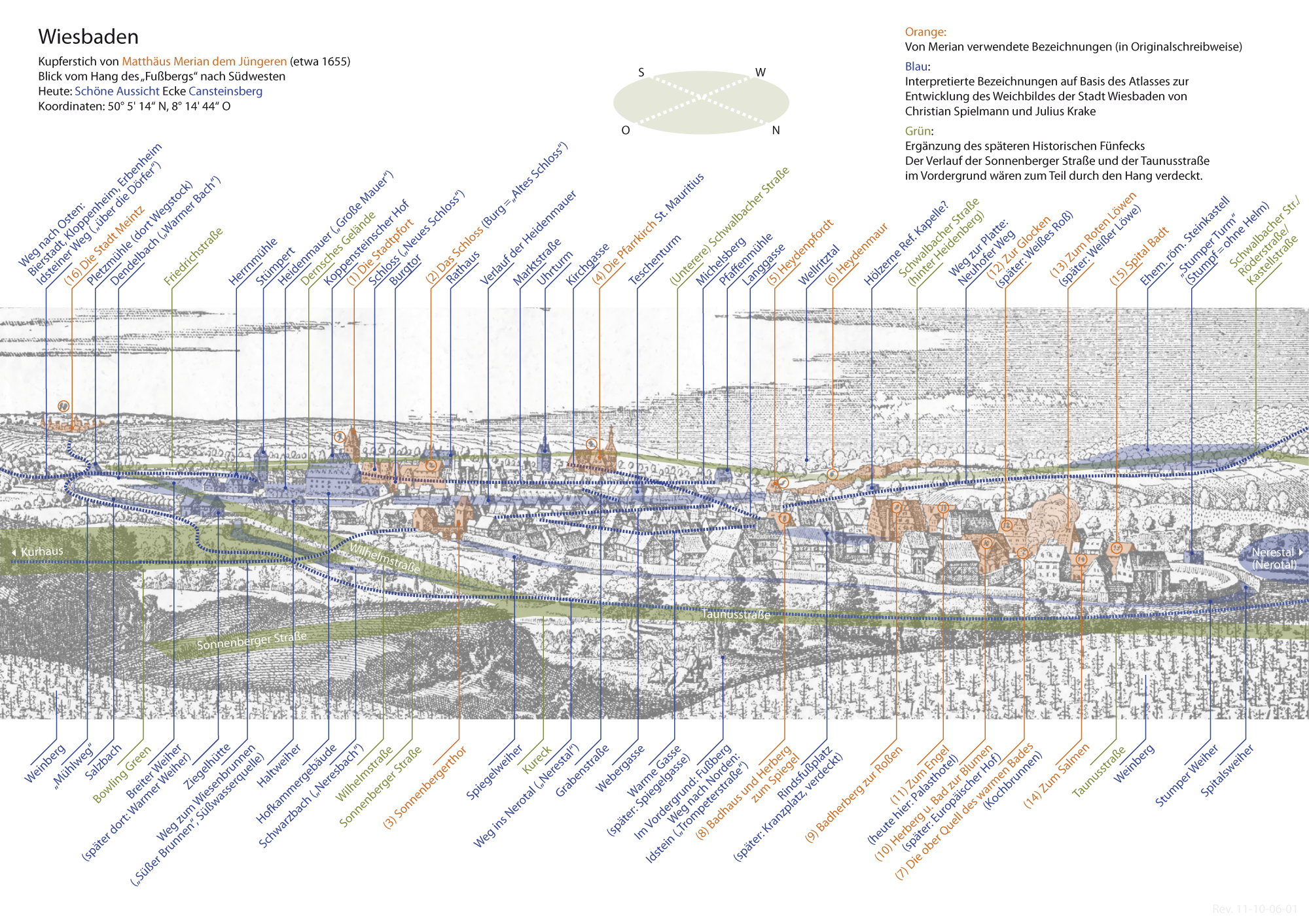 Erklärende Grafik zum historischen Dokument Wiesbaden - Auszug aus der Topographia Hassiae. Mit Interpretationen und Ergänzungen durch Konrad Conrad (Rev. 11-10-06-01).